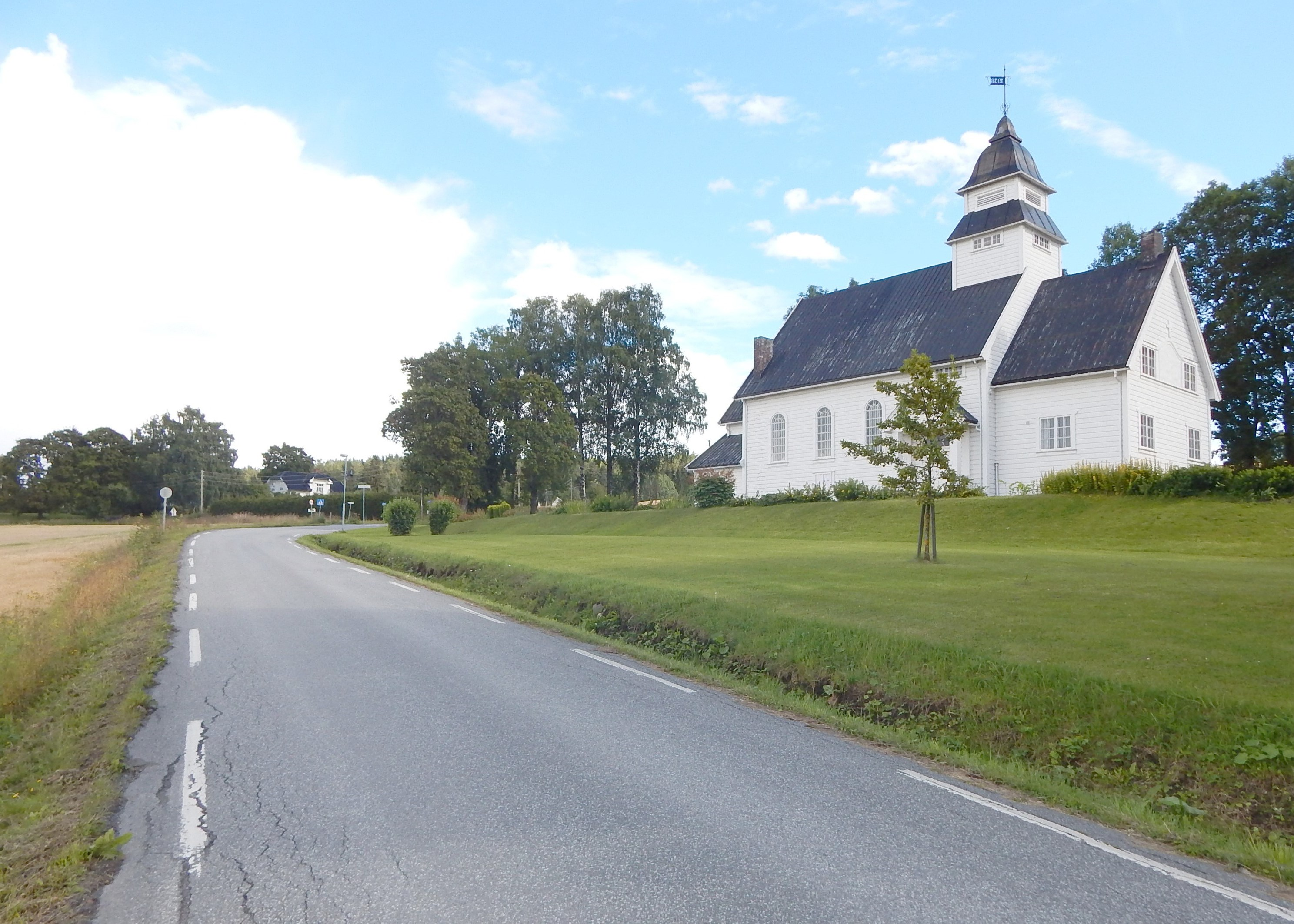 Nylinna forbi Kapp kirke